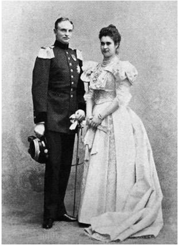 Prinzessin Maria Isabella von Württemberg und Prinz Johann Georg von Sachsen bei ihrer Hochzeit.